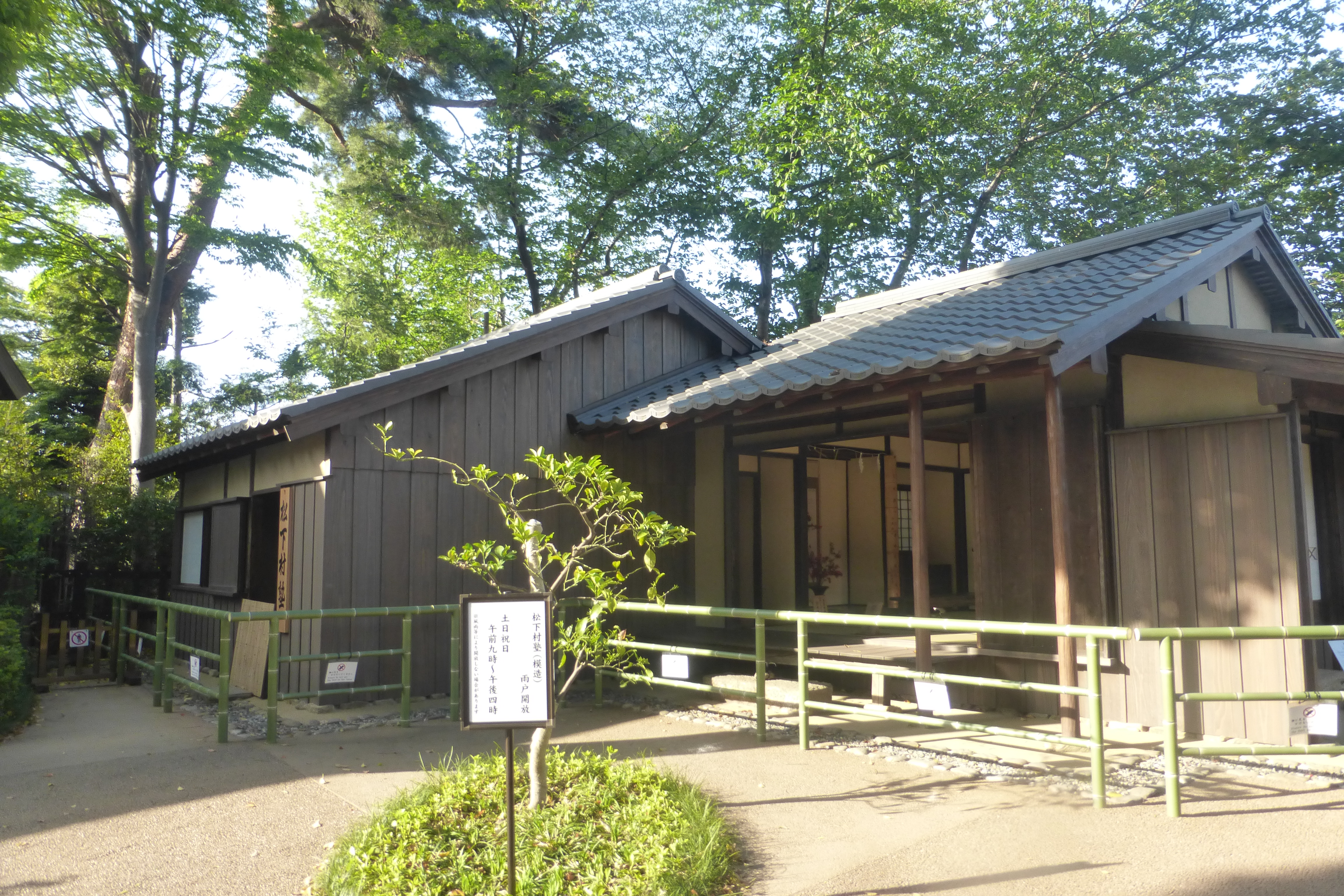 松陰神社 (Shōin-jinja shrine)